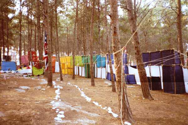 מחנה צופים ביער הזורע, 2002.